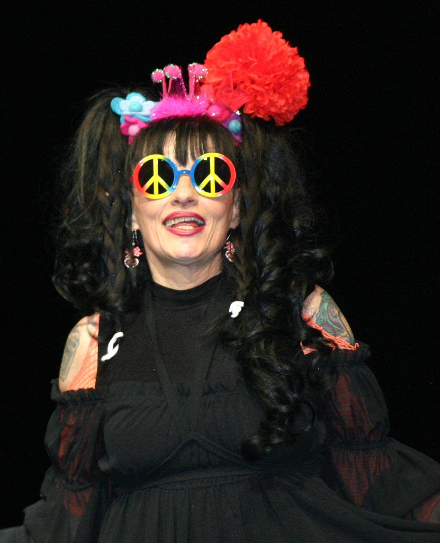 Nina Hagen während eines Auftritts im Berliner Ensemble.